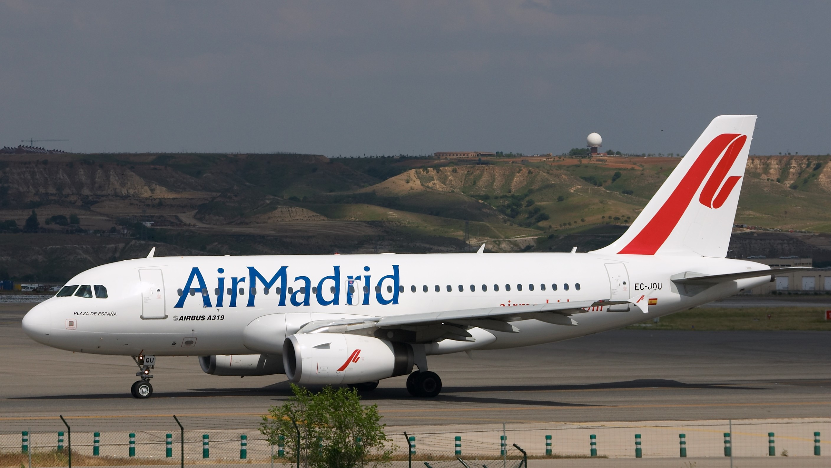 Airbus A319-132 de Air Madrid dirigiéndose hacia la pista para despegar. Aeropuerto de Madrid Barajas.